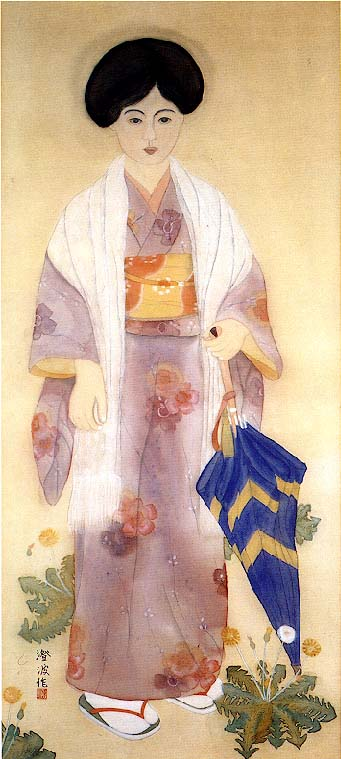 Description in